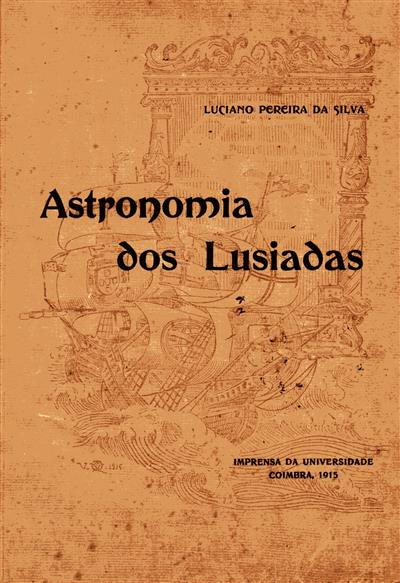 A astronomia dos Lusíadas / Luciano Pereira da Silva. - Coimbra : Imprensa da Universidade, imp. 2014. - [9], XV, 228 p. : il. ; 24 cm. - Facsímile da edição de Coimbra : Imprensa da Universidade, 1915. - ISBN 978-989-95920-7-0